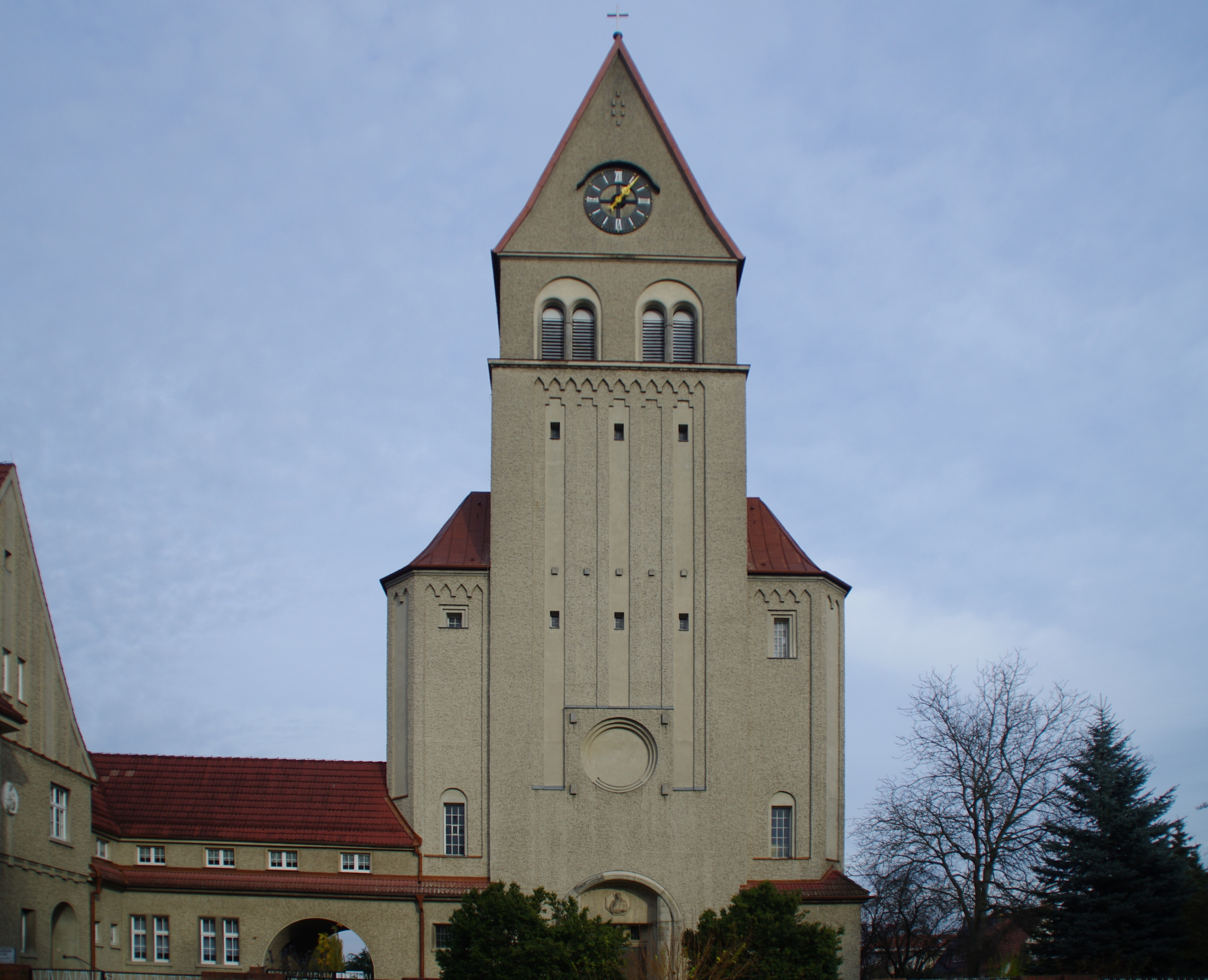 Wriezen in Brandenburg. Die katholische Kirche in der Freienwalder Straße 40 steht unter Denkmalschutz.